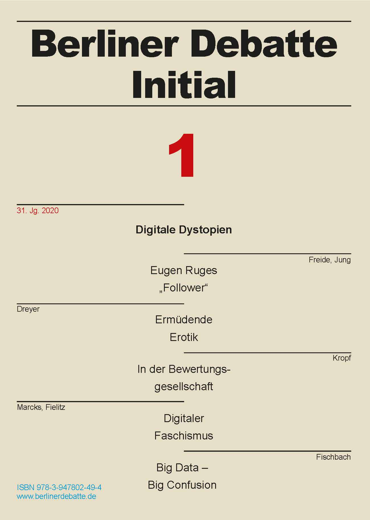 Berliner Debatte Initial, Heft 1/2020, Cover